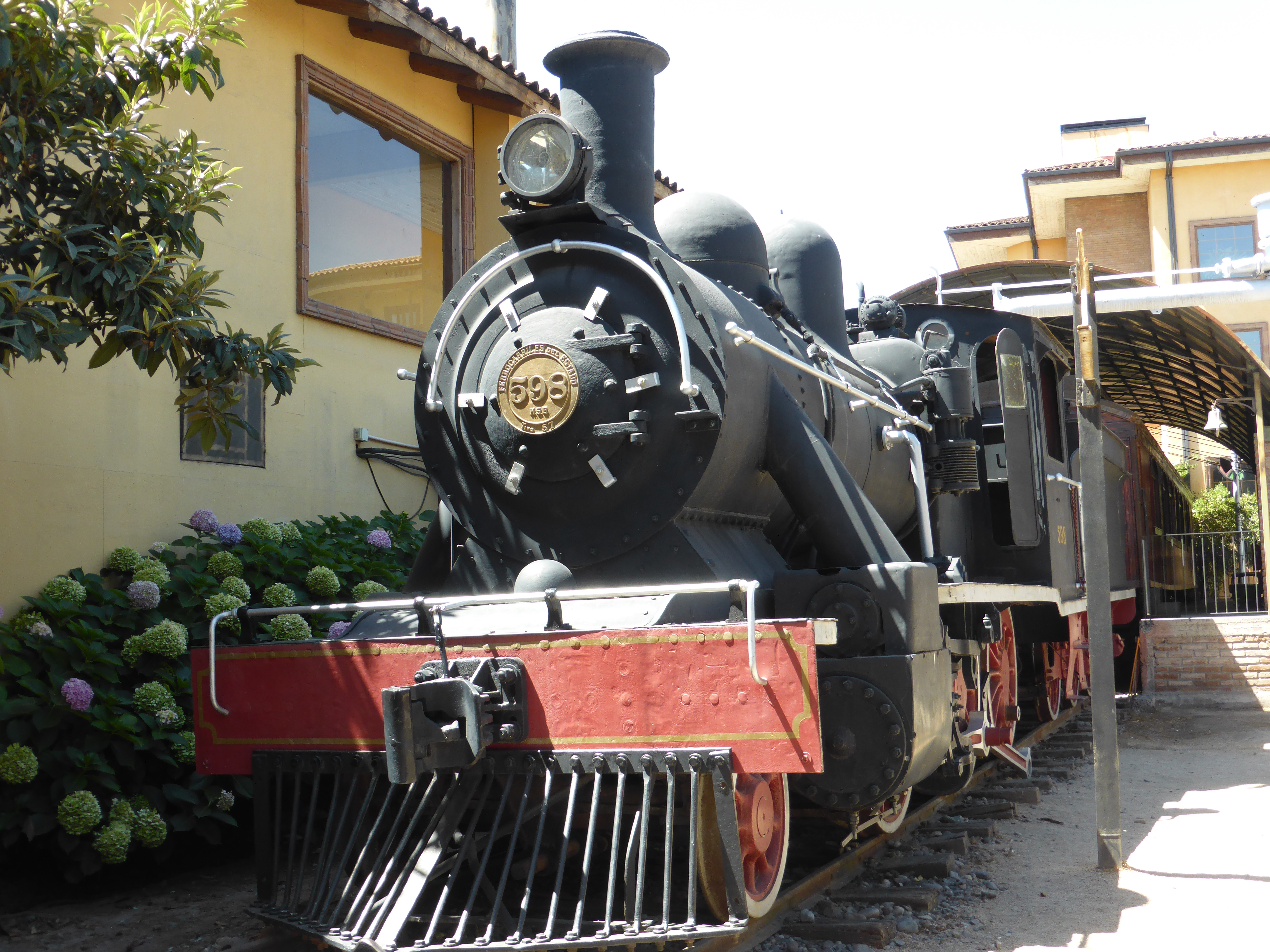 Locomotora de vapor número 598 de "Ferrocarriles del Estado", Maestranza de San Bernardo (M. S. B.). Esta locomotora, de vía o trocha ancha, fue clasificada como "Tipo 57". Para la fabricación y montaje de esta serie, se utilizaron planos de "North British" (Escocia, U. K.), entre los años 1908 y 1914. Su rodaje, en terminología norteamericana (notación Whyte), es "2-6-0" (un eje libre, con dos ruedas, y tres ejes acoplados, con seis ruedas). Actualmente esta máquina se encuentra en un patio del Museo de Colchagua, en Santa Cruz, Provincia de Colchagua, en la Región del Libertador General Bernardo O'Higgins. Chile.